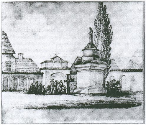 Крыж перад францысканскім касцелам ў Пінску